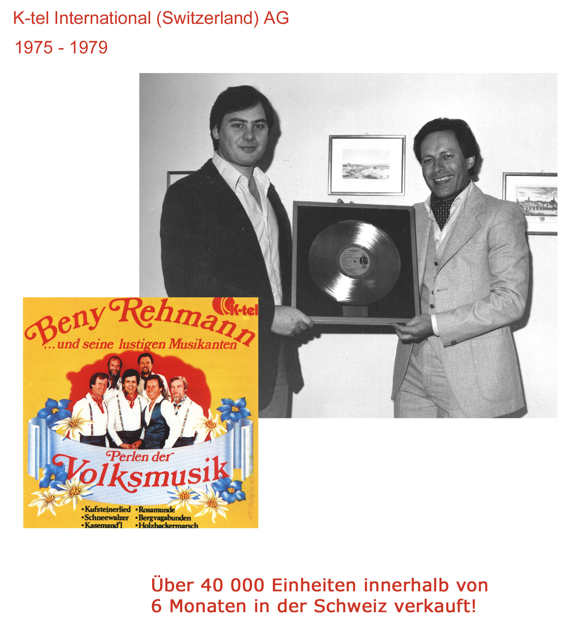 Übergabe der Goldenen LP für über 40'000 mit TV-Werbung in der Schweiz verkaufter Tonträger Vito Cordani GF von K-Tel Schweiz/Italien und Beny Rehmann